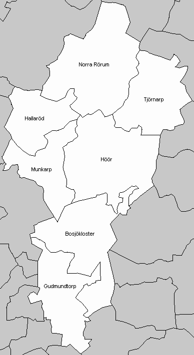 Socken in Höör